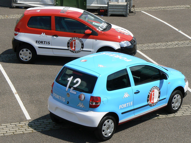 Fortis Feyenoord Cars